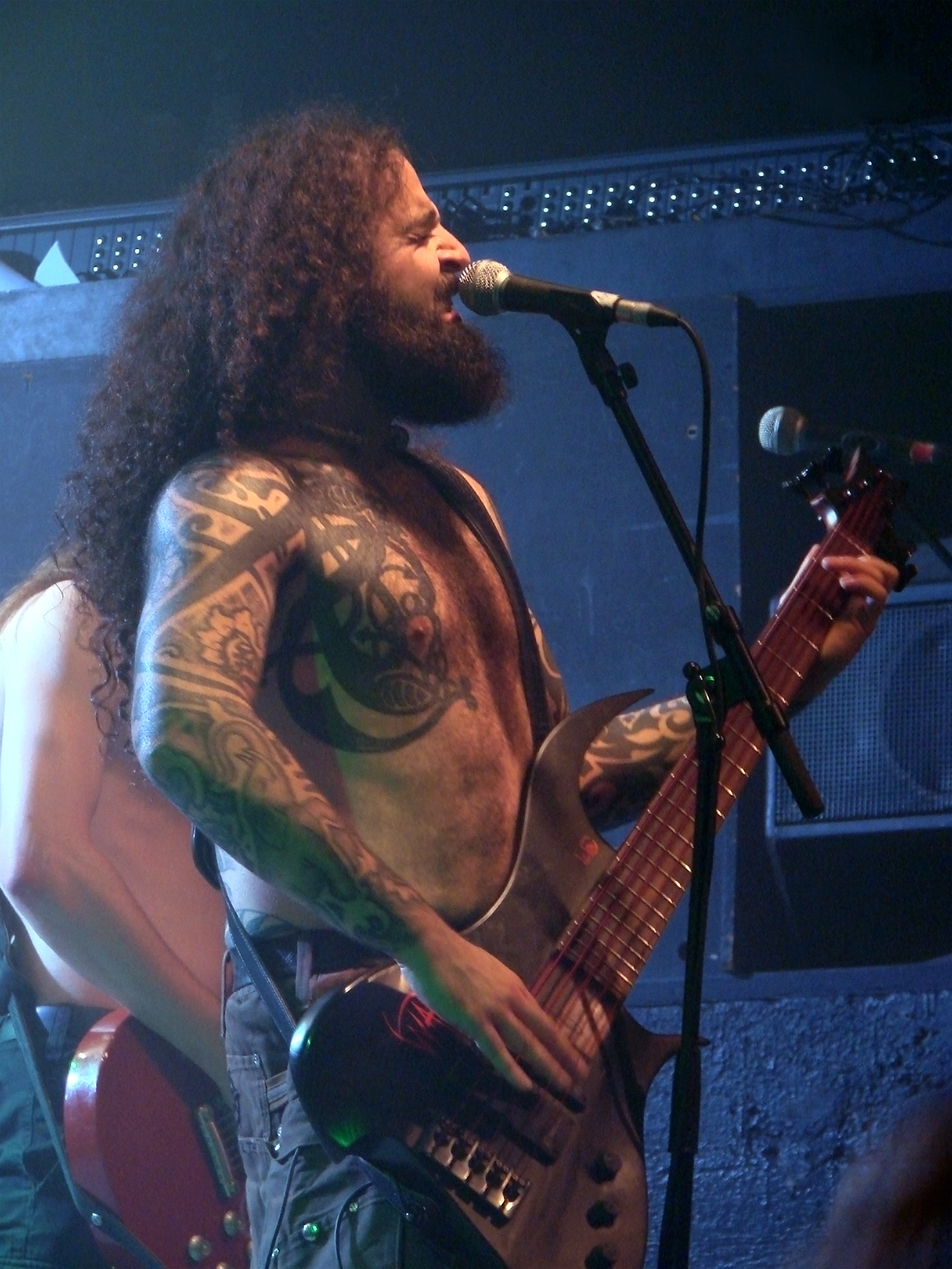 Eluveitie au Cernunnos Fest 07, le 16/12/07 à la Locomotive, Paris.